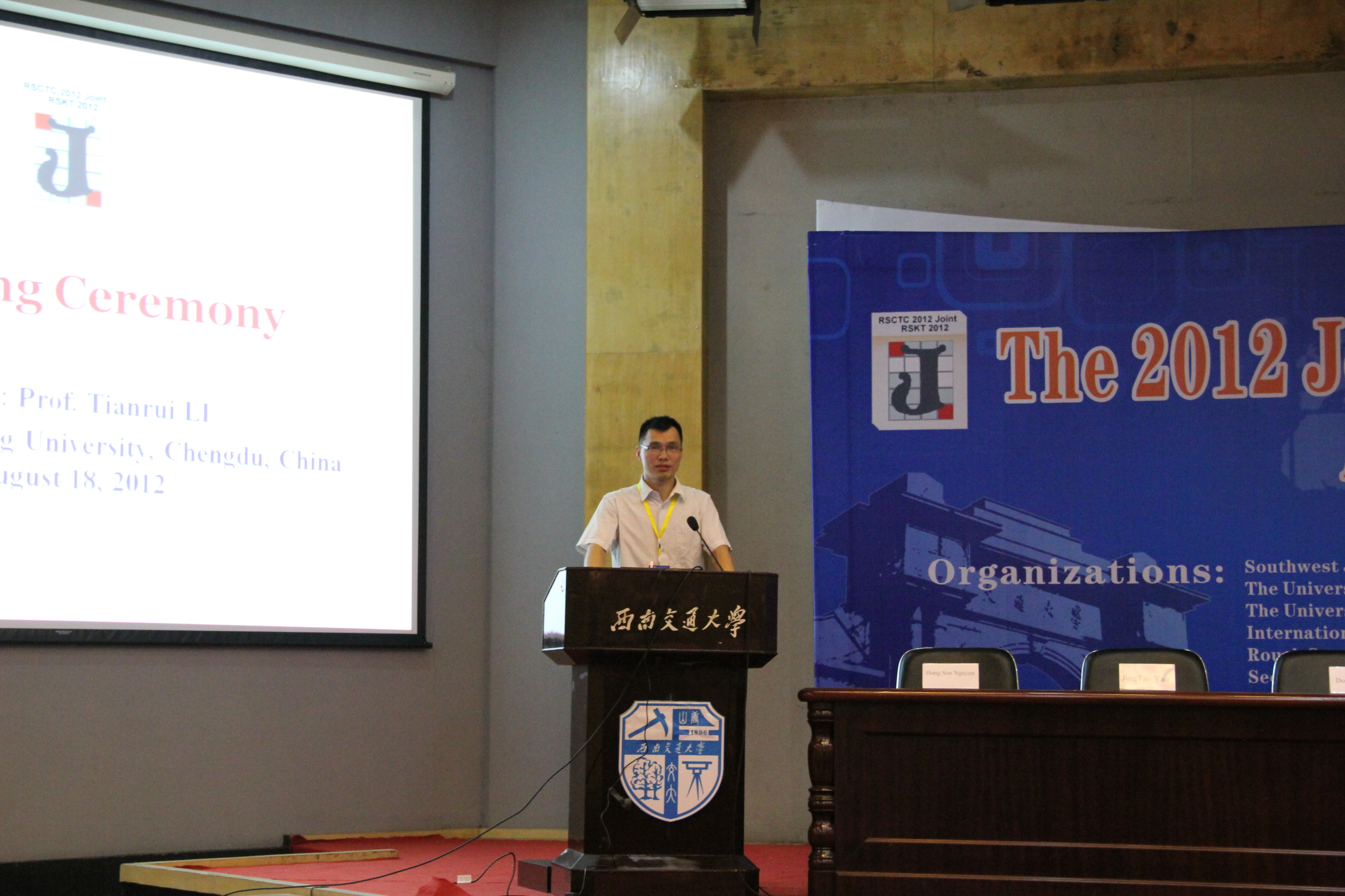 中文（中国大陆）: 李天瑞教授主持JRS2012